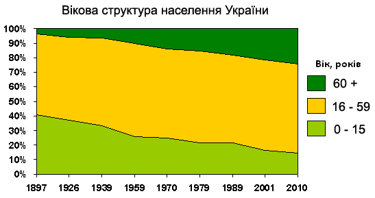 Динаміка основних вікових груп населення України